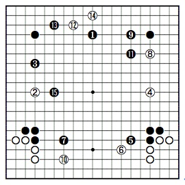 第8期本因坊戦挑戦手合七番勝負第6局 1953年7月7-8日 本因坊秀格(先番)-木谷實八段 17-35手